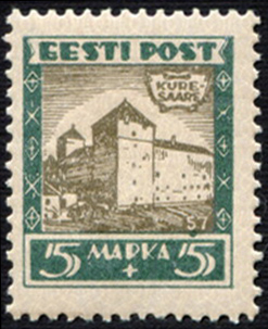 Почтовая марка Эстонии. Курессааре, Епископский замок